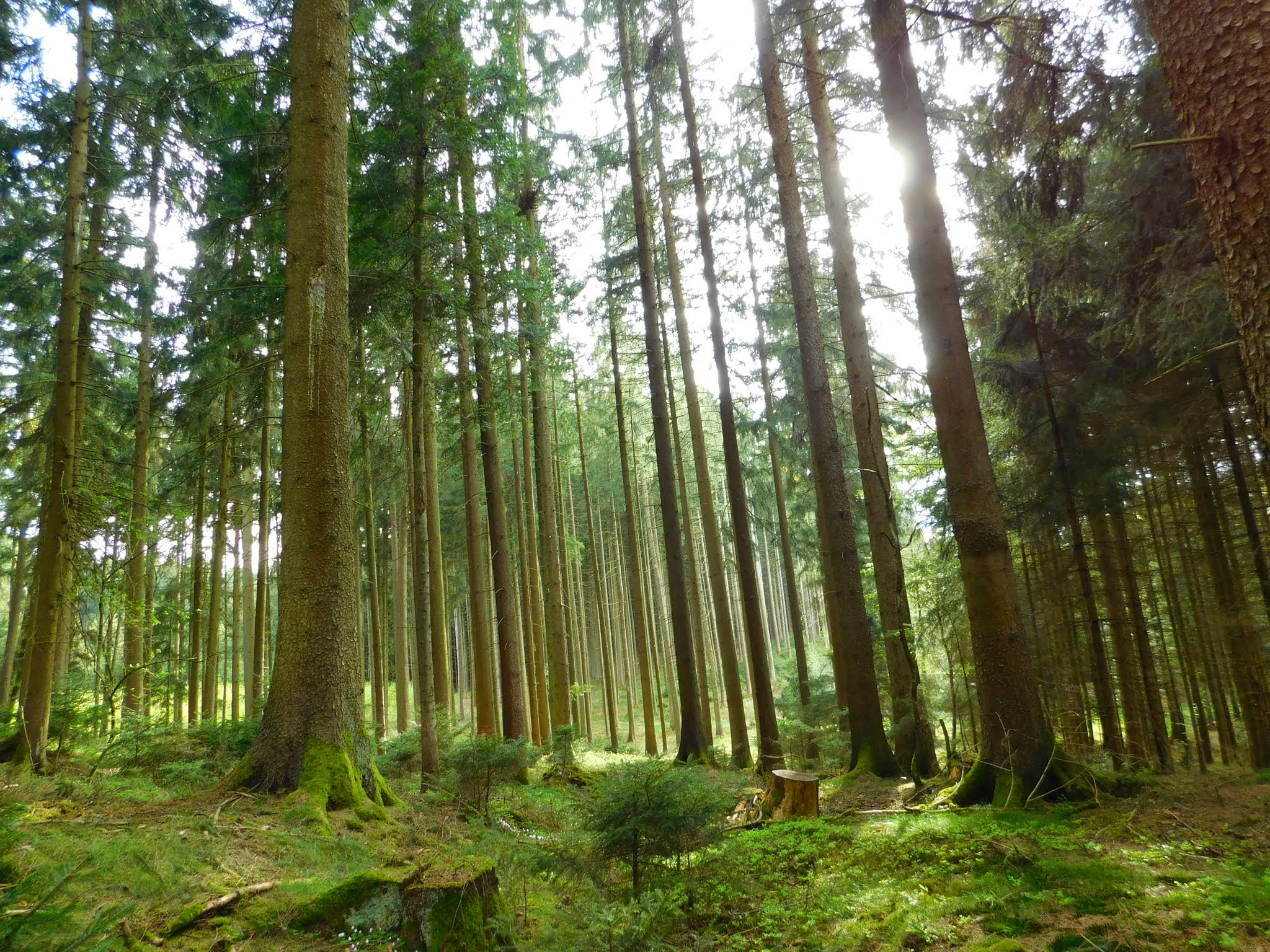 Ein Bild aus dem Wald bei Rogglfing (Dorfen)